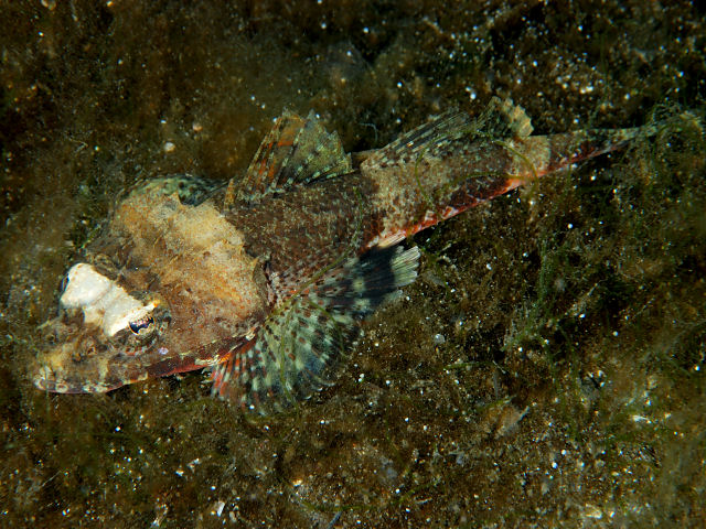 オニゴチ Onigocia spinosa